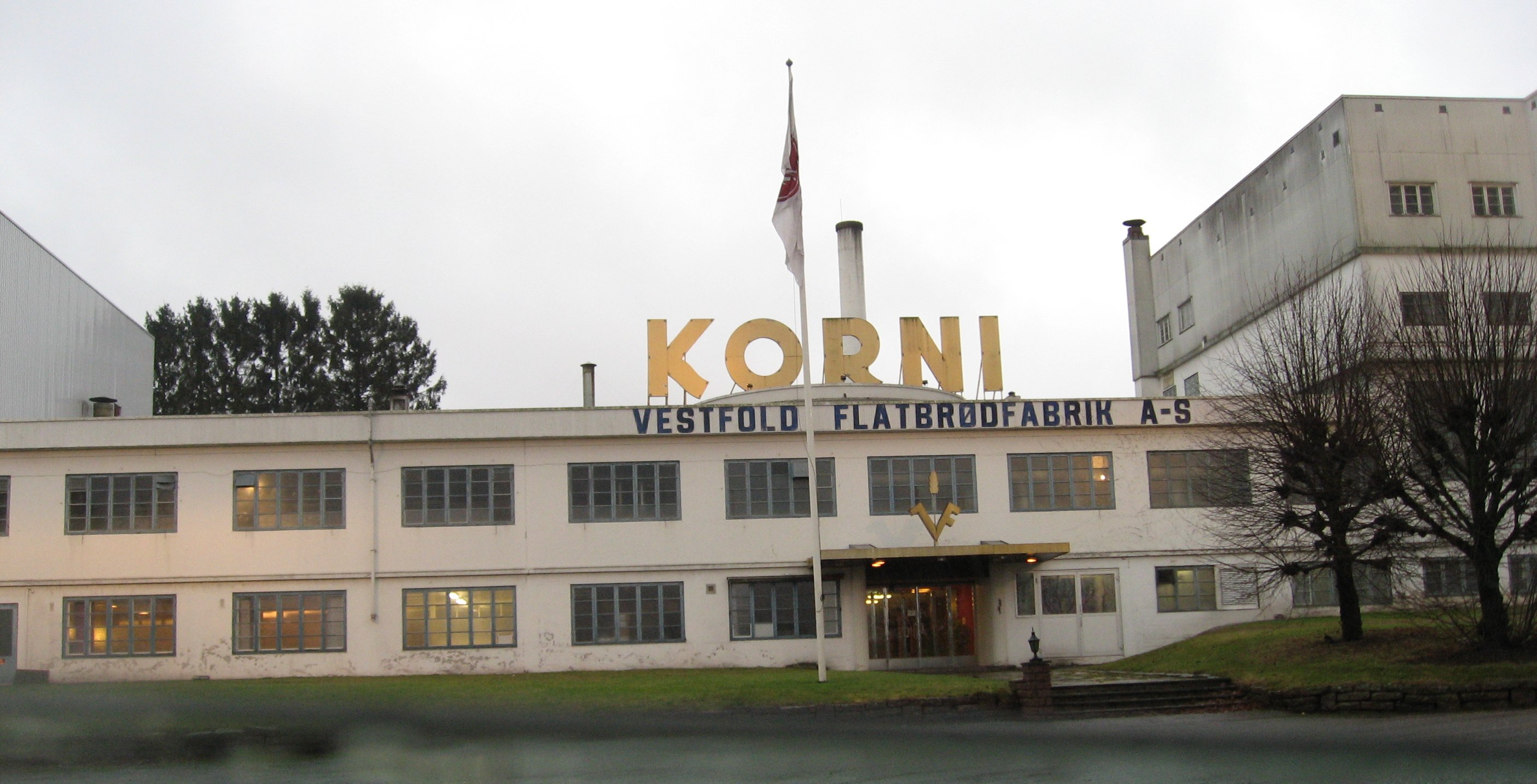 Vestfold Flatbrødfabrik